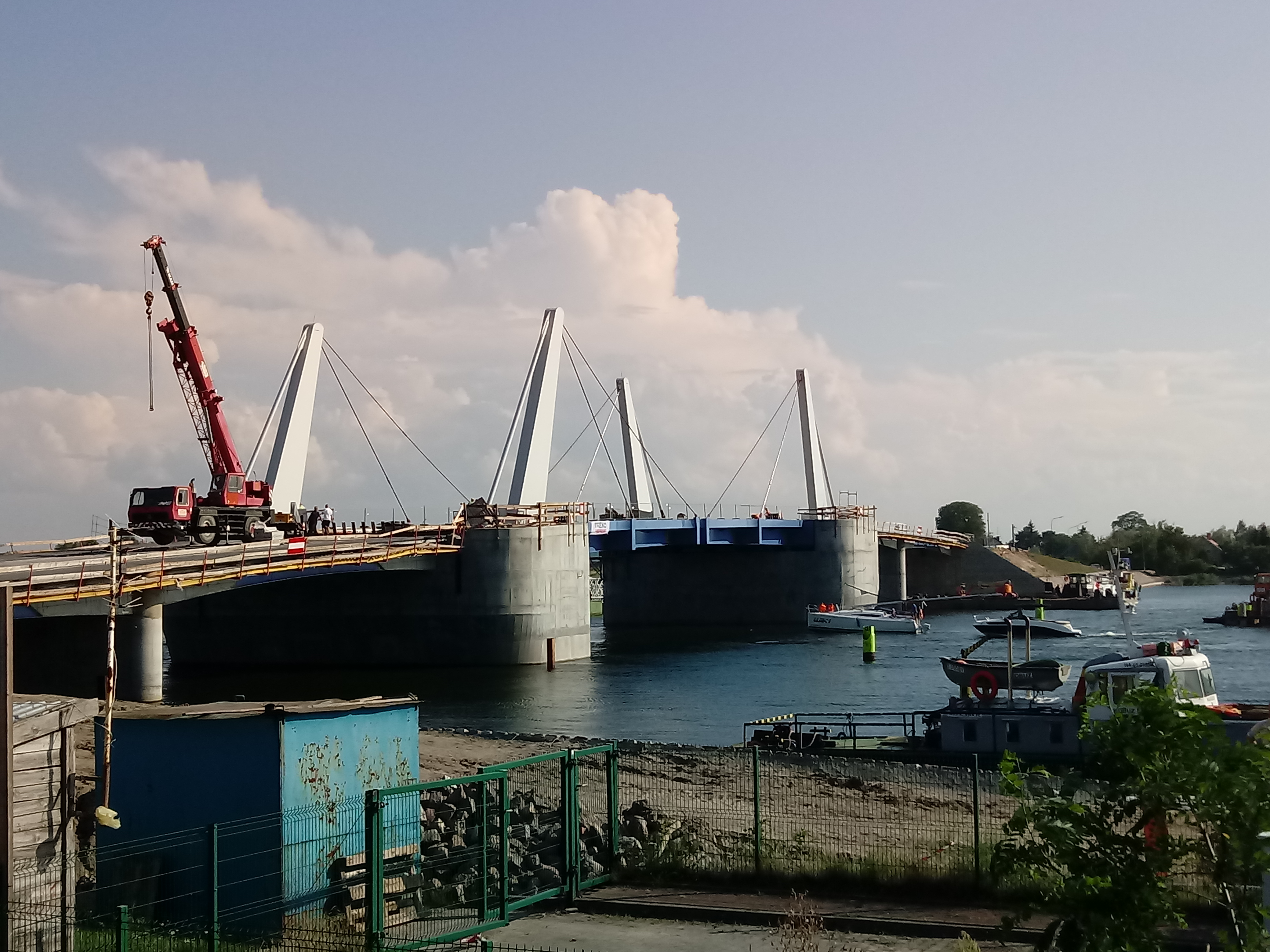 Most 100-lecia Niepodległości Rzeczypospolitej w trakcie budowy